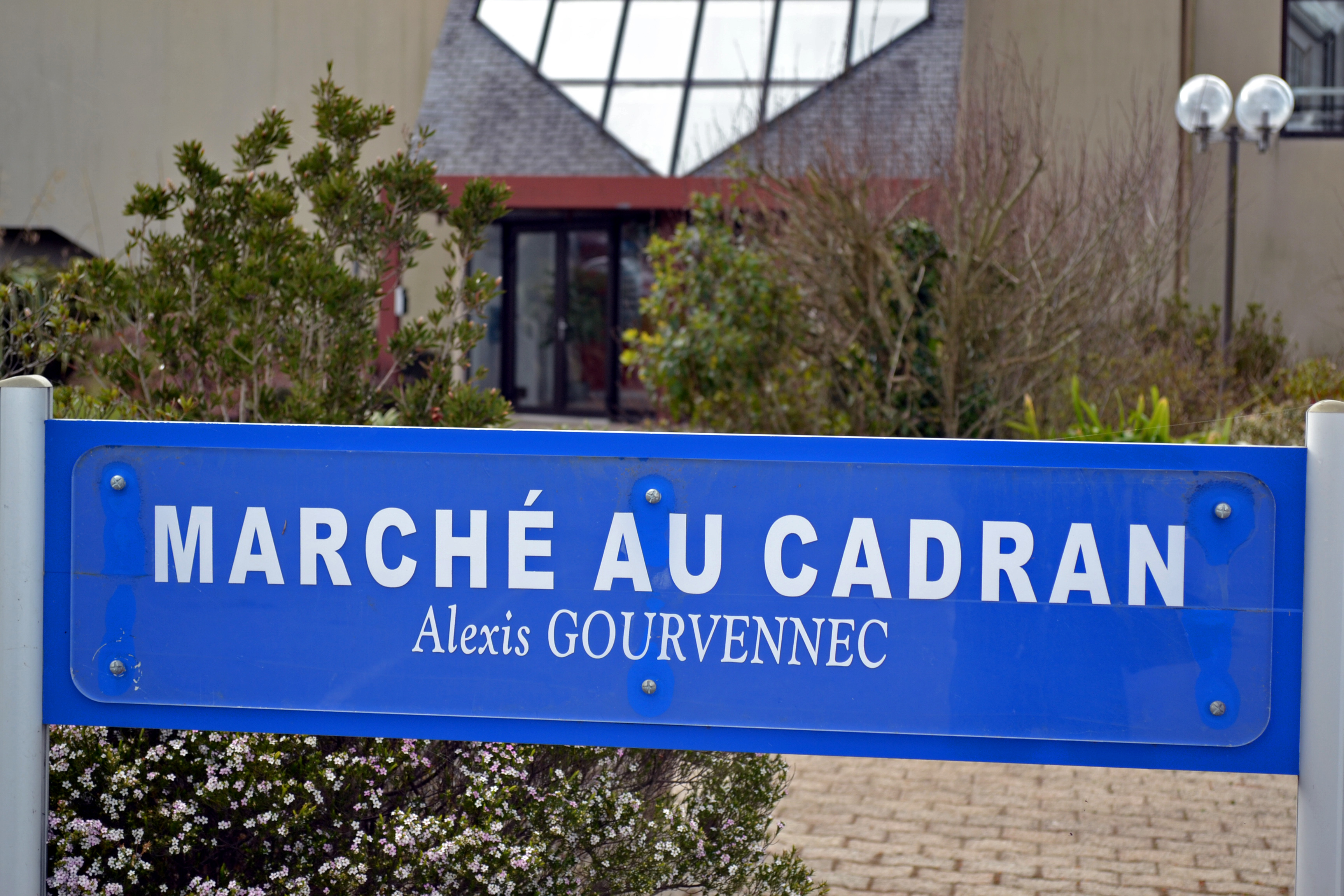 Marché au cadran de la SICA construit en 1961 à l'initiative du leader agricole Alexis Gourvennec sur le site de Kérisnel à Saint-Pol-de-Léon.